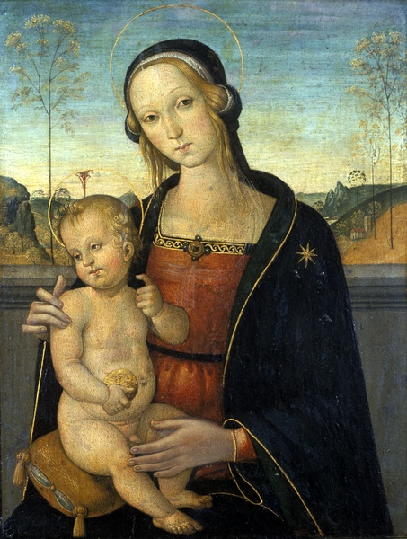 Tiberio d'Assisi: Madonna col Bambino, 41,5 x 32,5 cm, tp/tv, Altenburg, öffentliche Sammlung